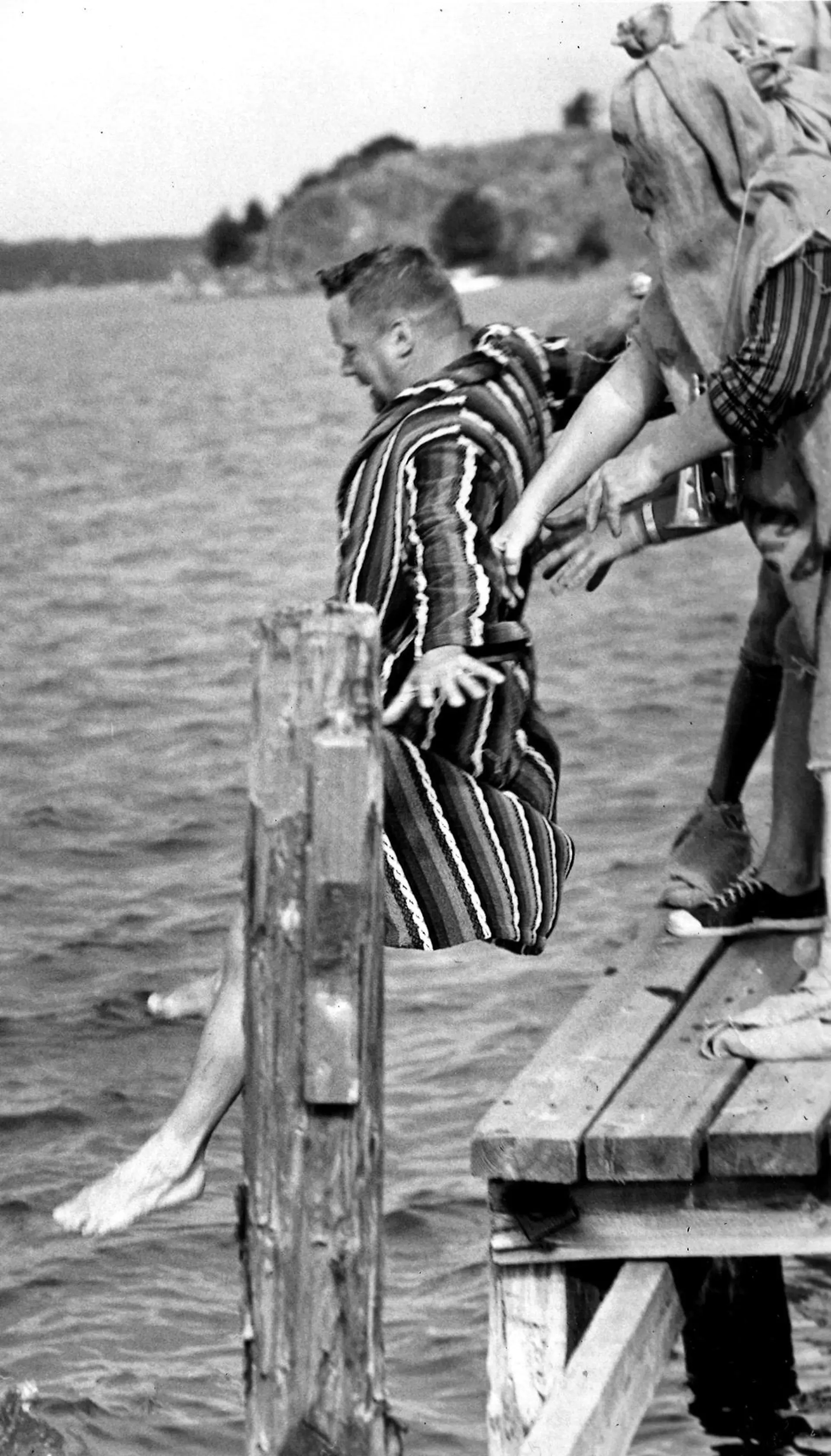 Unikeko Jaakko Sajo heitetään veteen Naantalin Unikeonpäivillä 27.7.1967. Kuva julkaistu alunperin Helsingin Sanomissa 28.7.1967.